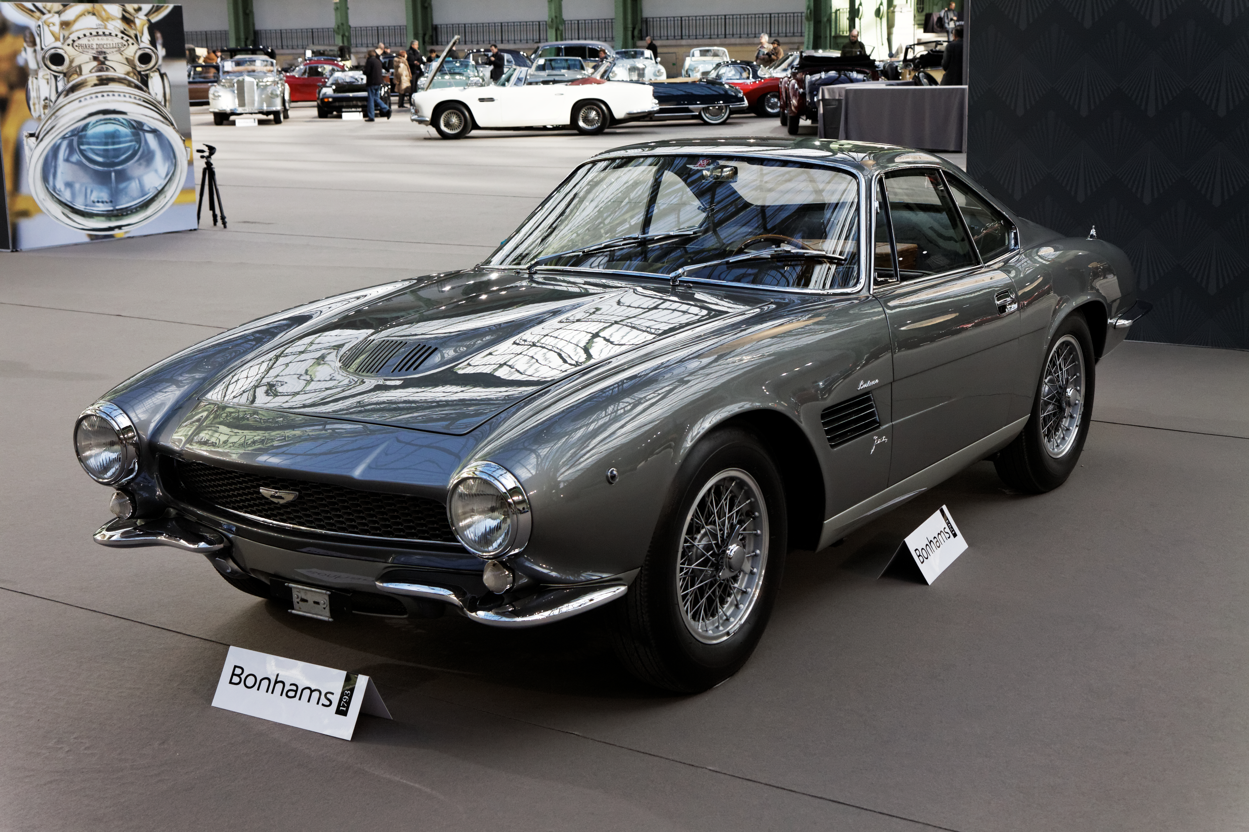 Une Aston Martin DB4GT Bertone Jet de 1960.